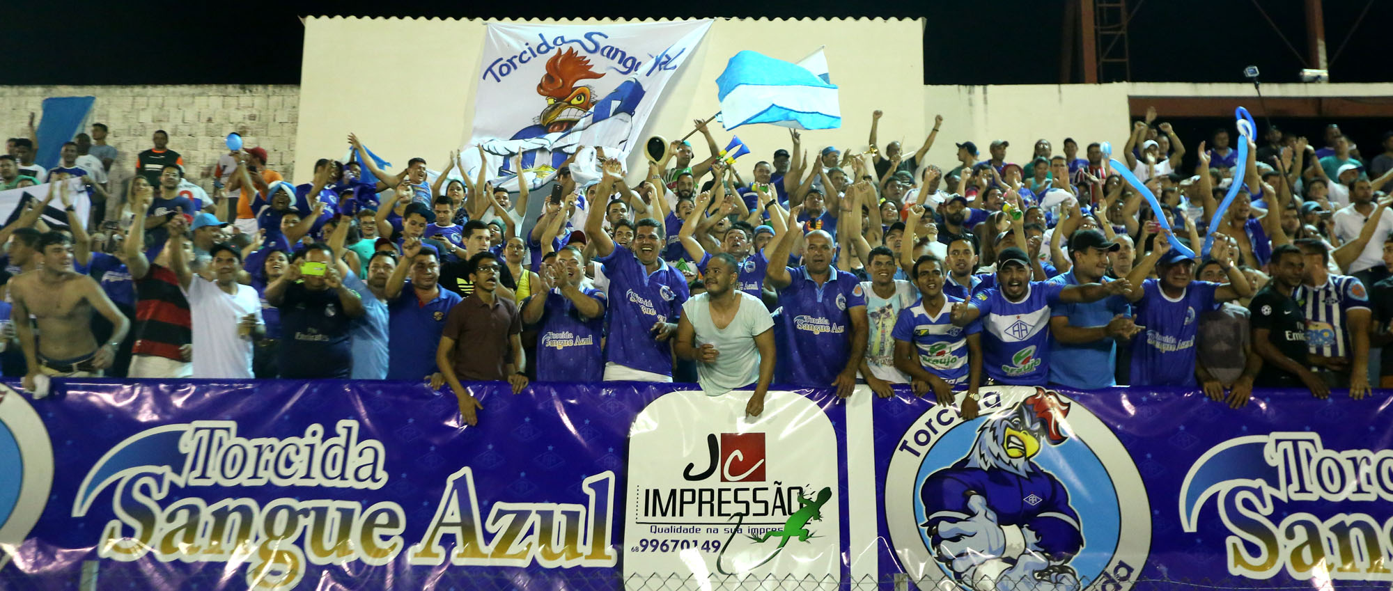 Foto: Sérgio Vale/Secom